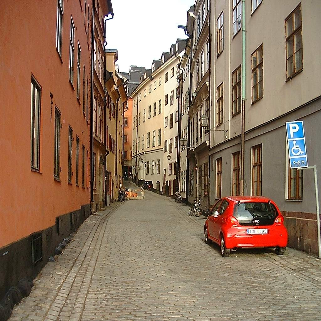 Drakens Gränd viewed from Skeppsbron.